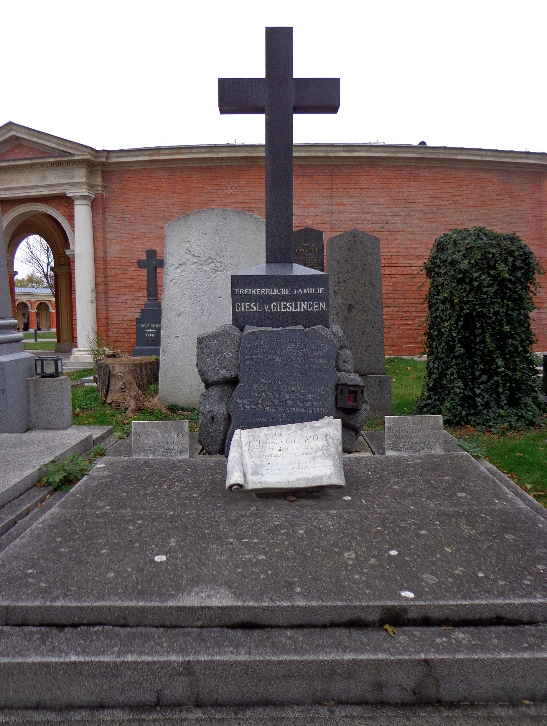 Wiener Zentralfriedhof - Gruppe 31A: Grab der Freiherren Giesl von Gieslingen, in dem u.a. der k.u.k. Feldzeugmeister Heinrich und der k.u.k. General der Kavallerie Arthur Giesl von Gieslingen bestattet sind.